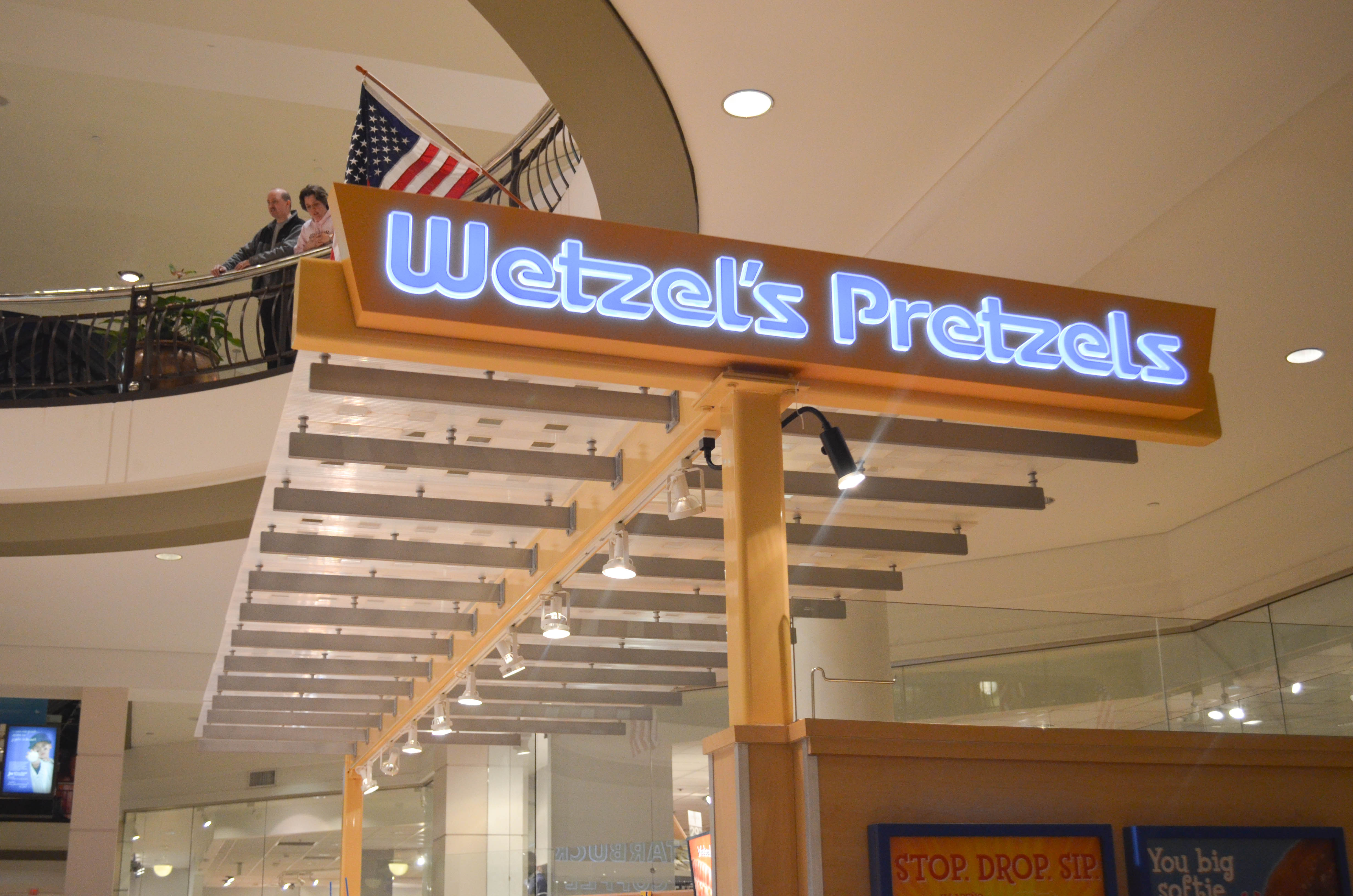 Wetzel's Pretzels - Tysons Corner Mall